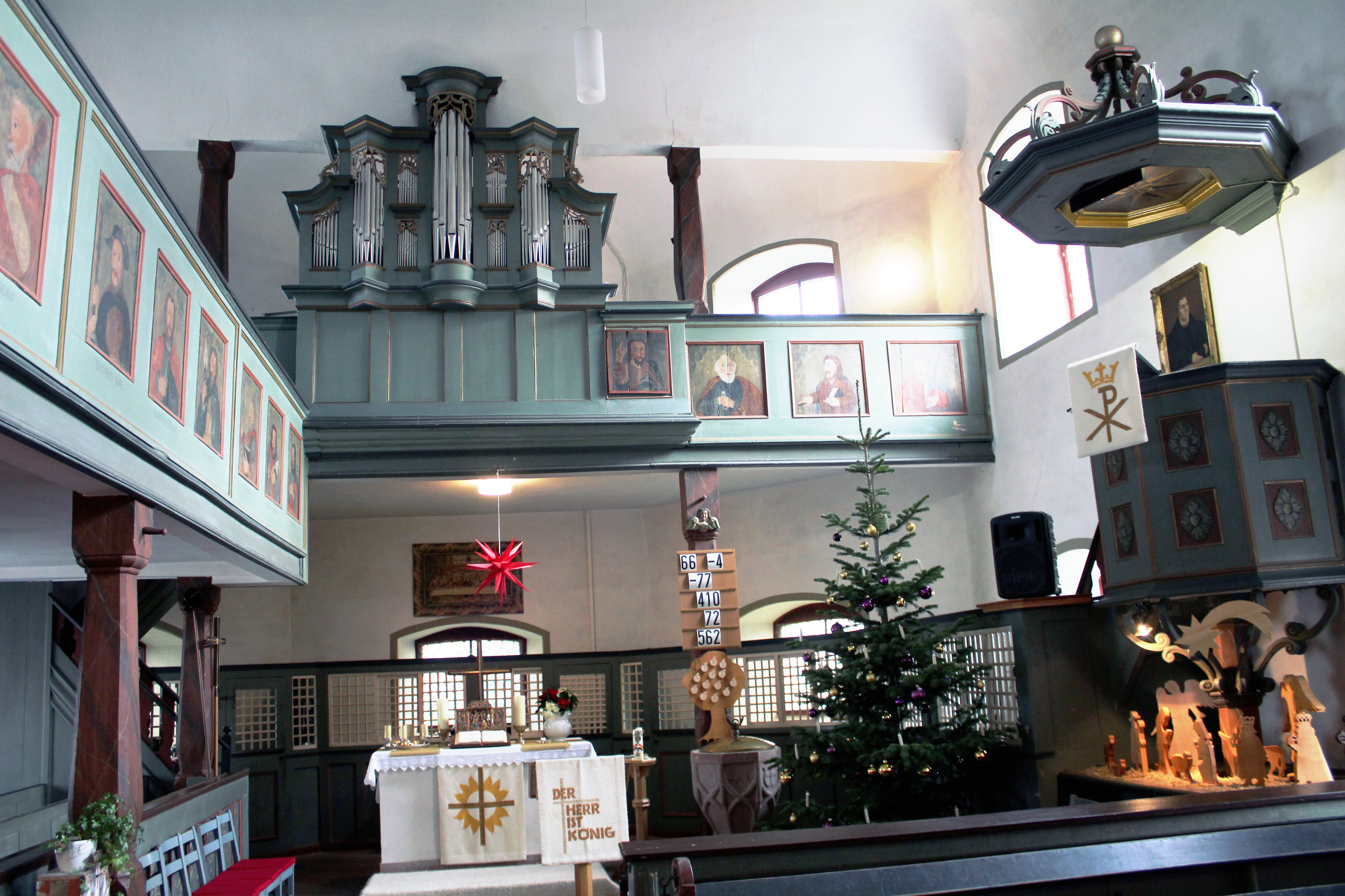 Evangelische Kirche Groß-Eichen, Gemeinde Mücke, Vogelsbergkreis, Hessen, Deutschland